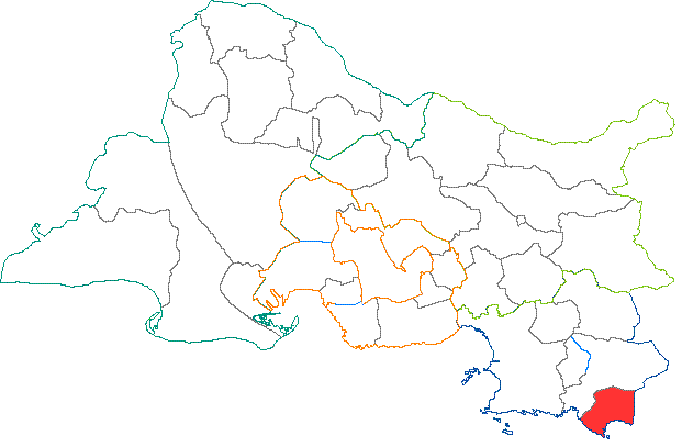 Situation du canton dans le département des Bouches du Rhône (France)